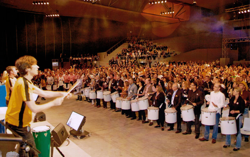 Trommelworkshop